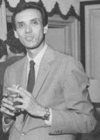 Juanito Belmonte- actor y empresario